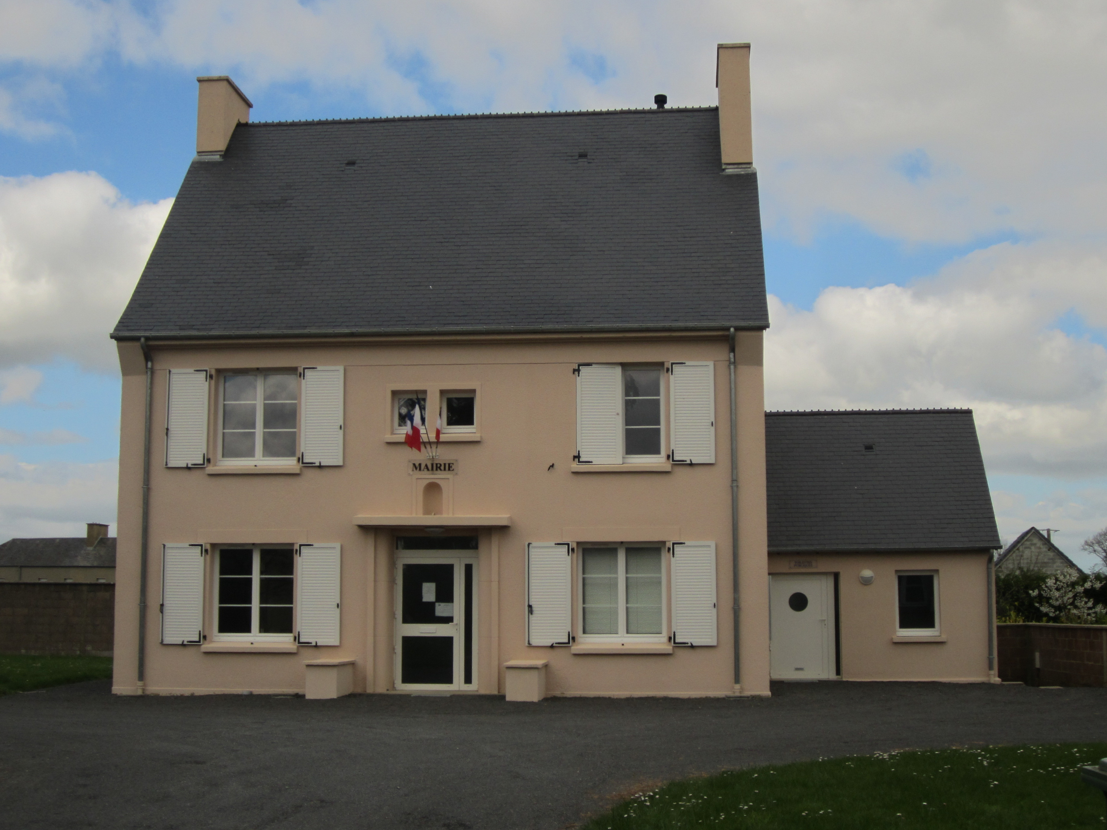 Les Champs-de-Losque, Mairie